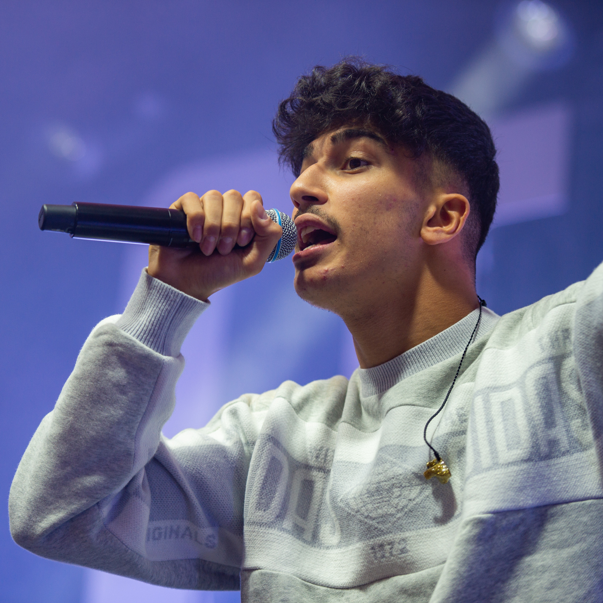 Concertbüro Franken,Konzert,Livekonzert,Livemusik,Löwensaal,Mero,Musik